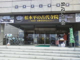 長野県松本市立博物館が、2010年12月4-26日に、「松本平の古代寺院－牛伏寺・若澤寺を中心として－」を開催した際の入り口での表示。携帯電話での撮影